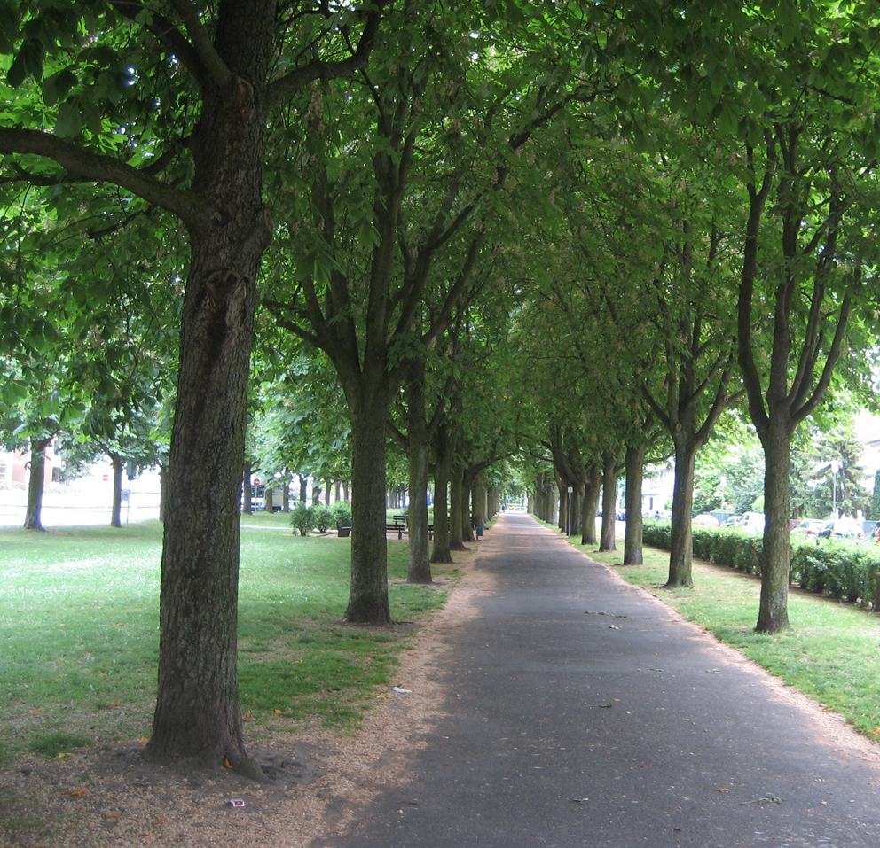 Landgrafeinring, Offenbach am Main